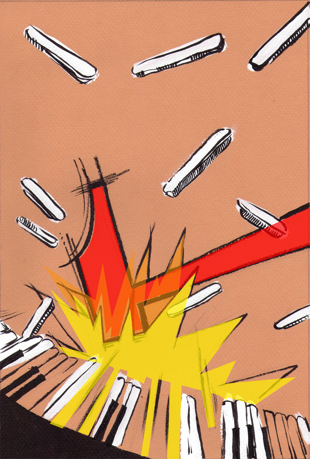 Imatge il·lustrant els desconcertants concerts de Fluxus